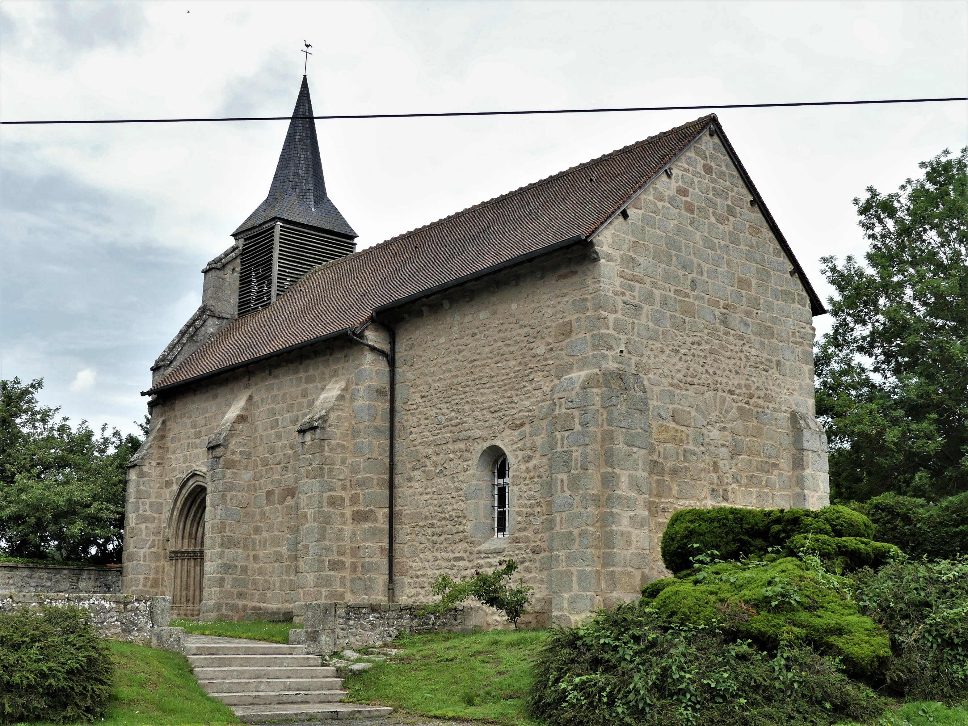 L'église de Saint-Pardoux-le-Neuf, Creuse, France.